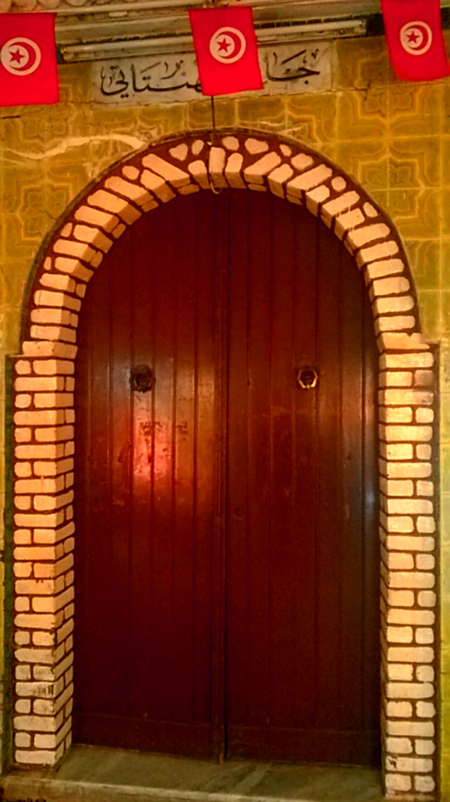 La médina de Tunis مدينة تونس العتيقة